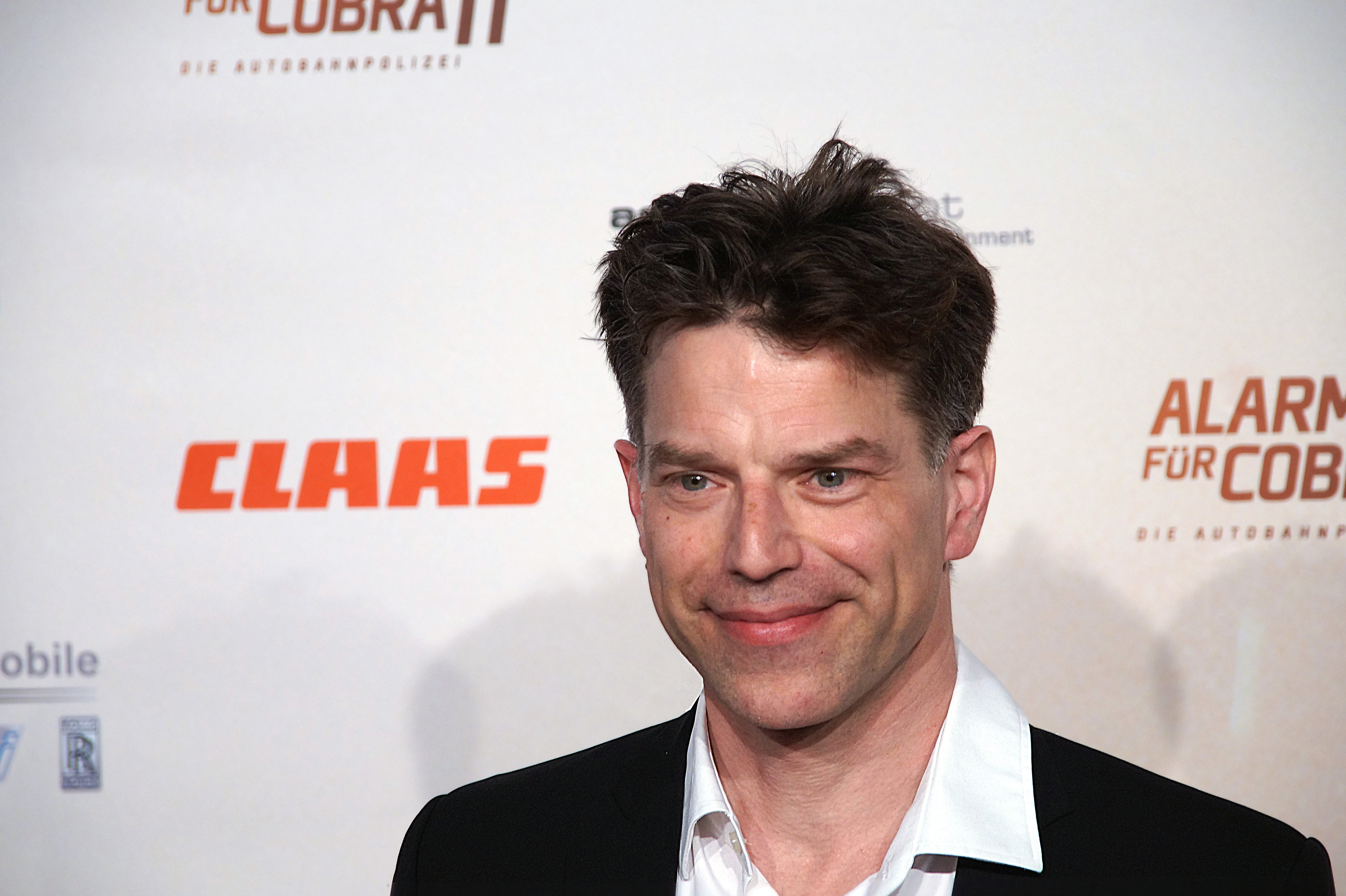 Johannes Brandrup bei der Premiere von der 300. Folge 'Alarm für Cobra 11', April 2016.